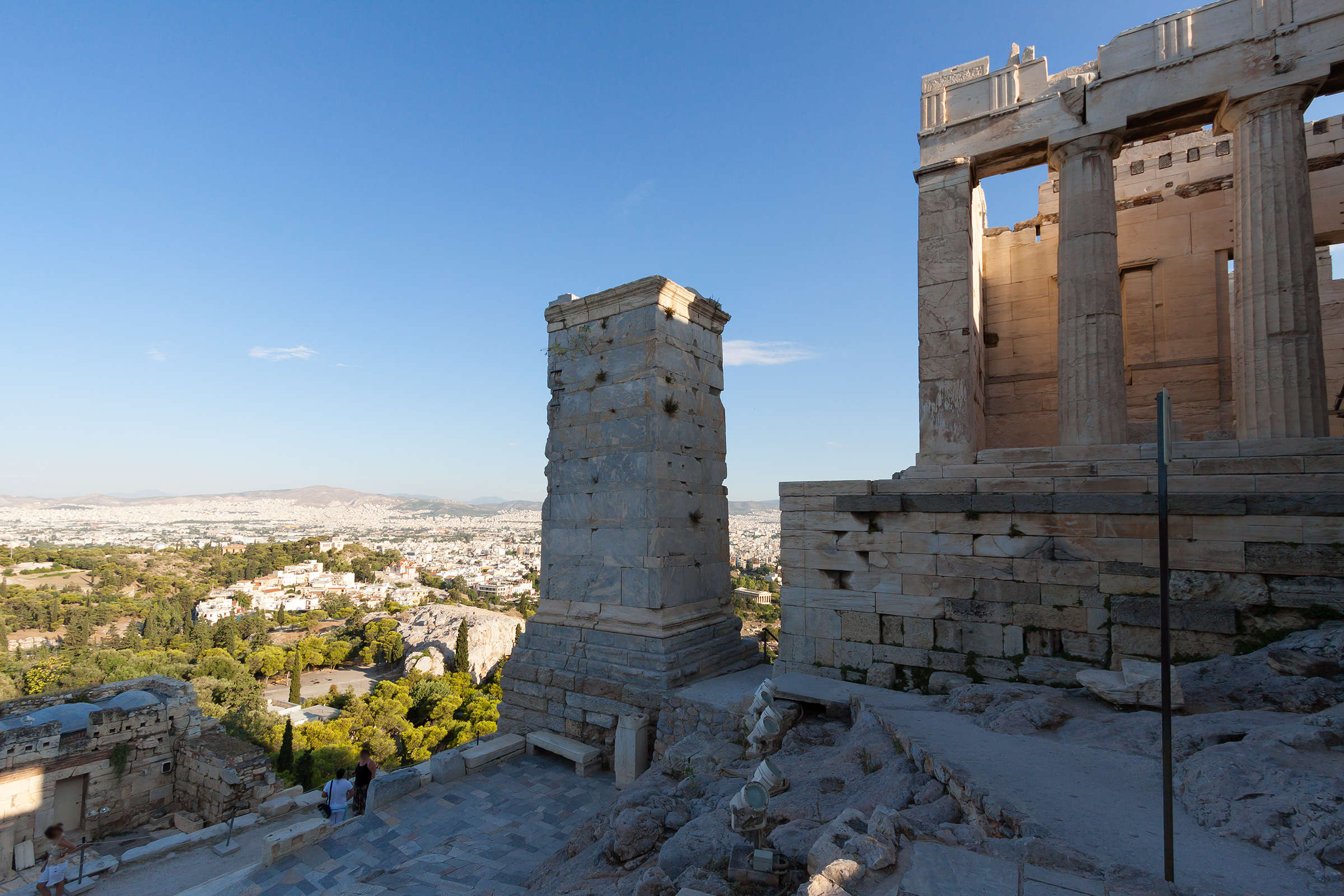 Вид от Пропилеев Акрополя на Ареопаг